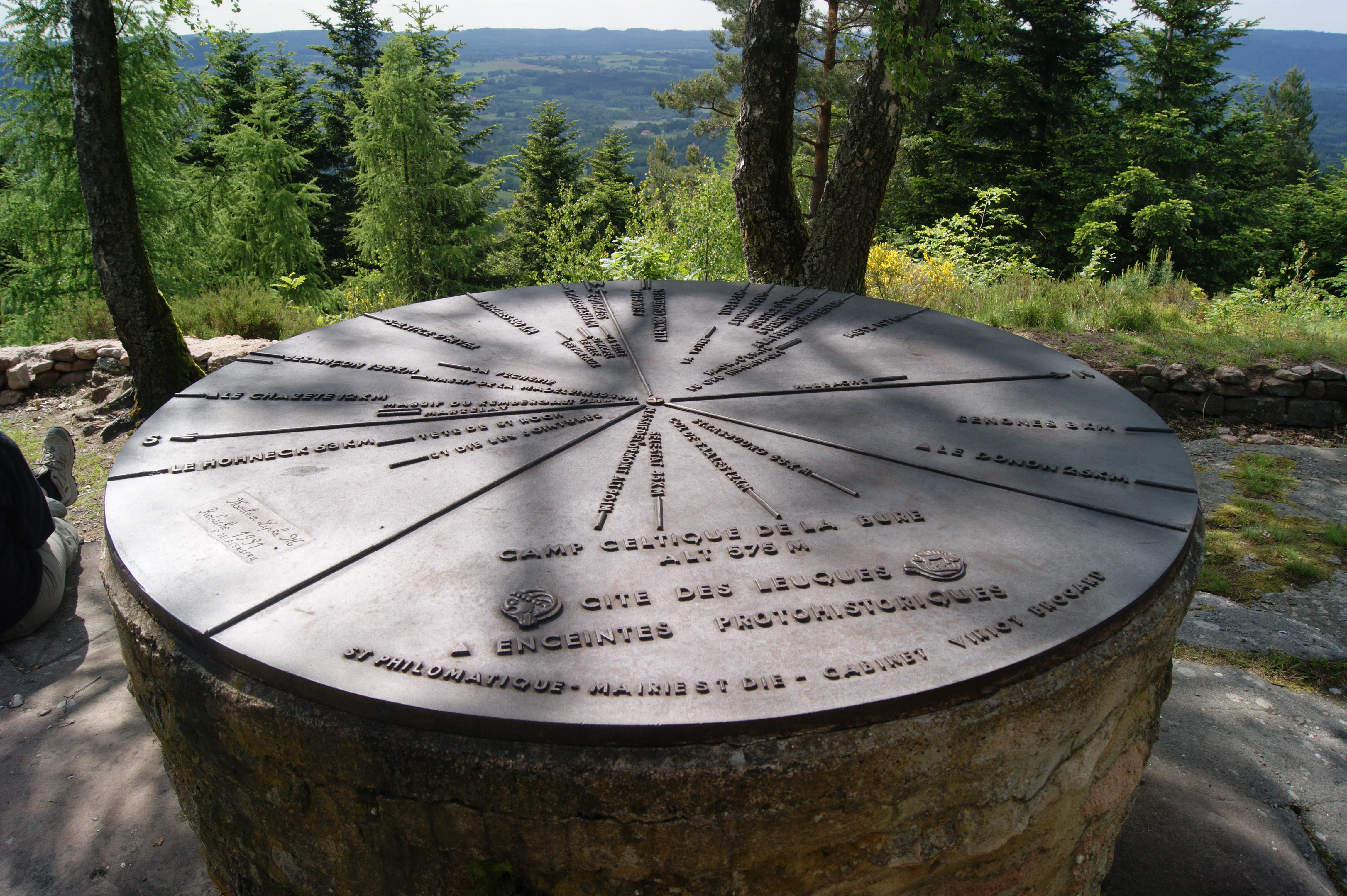 Site de hauteur fortifié de la Bure (Vosges, France) : table d'orientation à_l'extrémité Ouest_du_site, installée_en 1992.